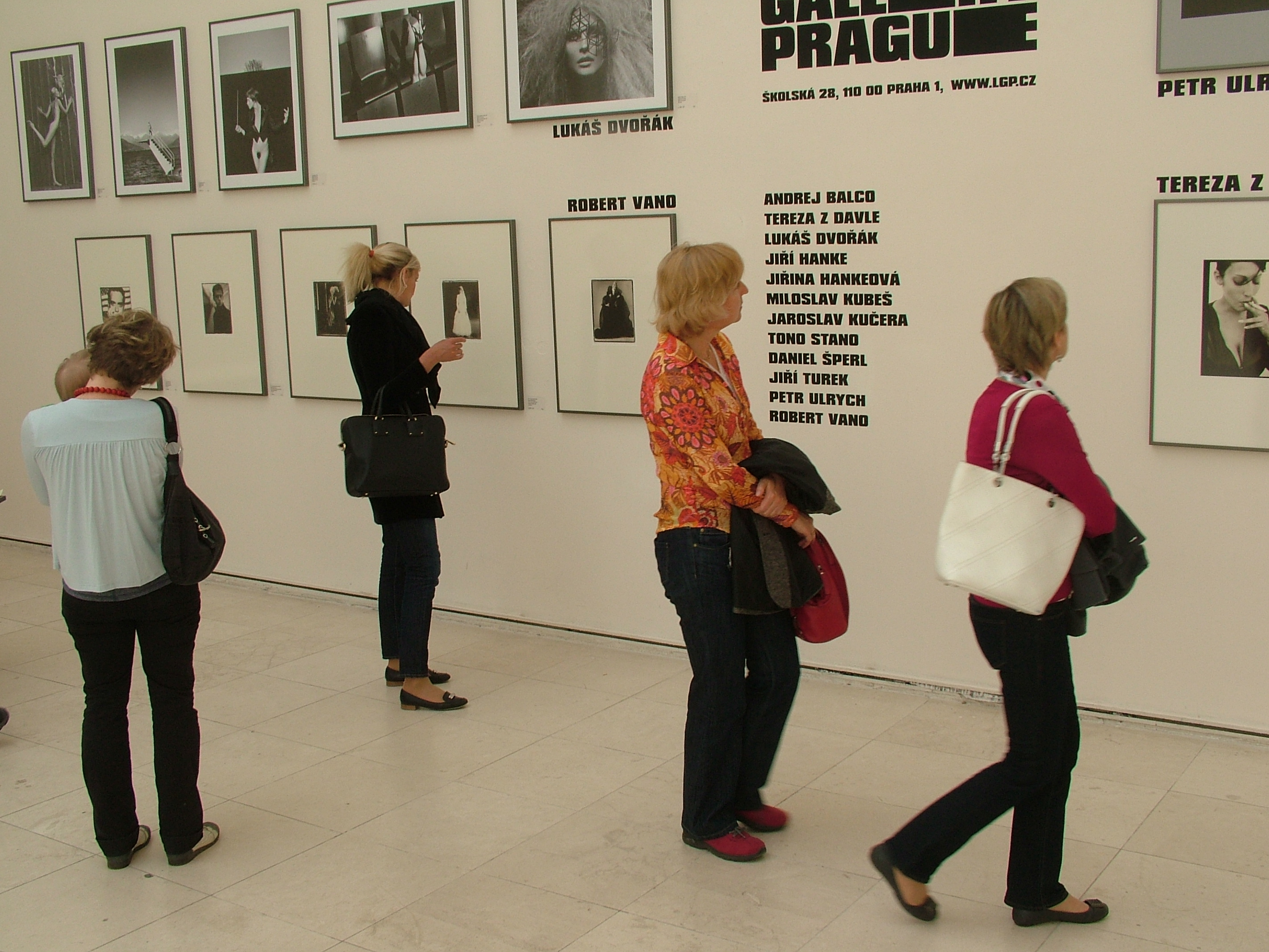 Výstava, festival, Prague Photo 2011 Budova: Mánes, Praha Trvání: od 4. dubna do 10. dubna 2011. Datum: 10. dubna 2011.